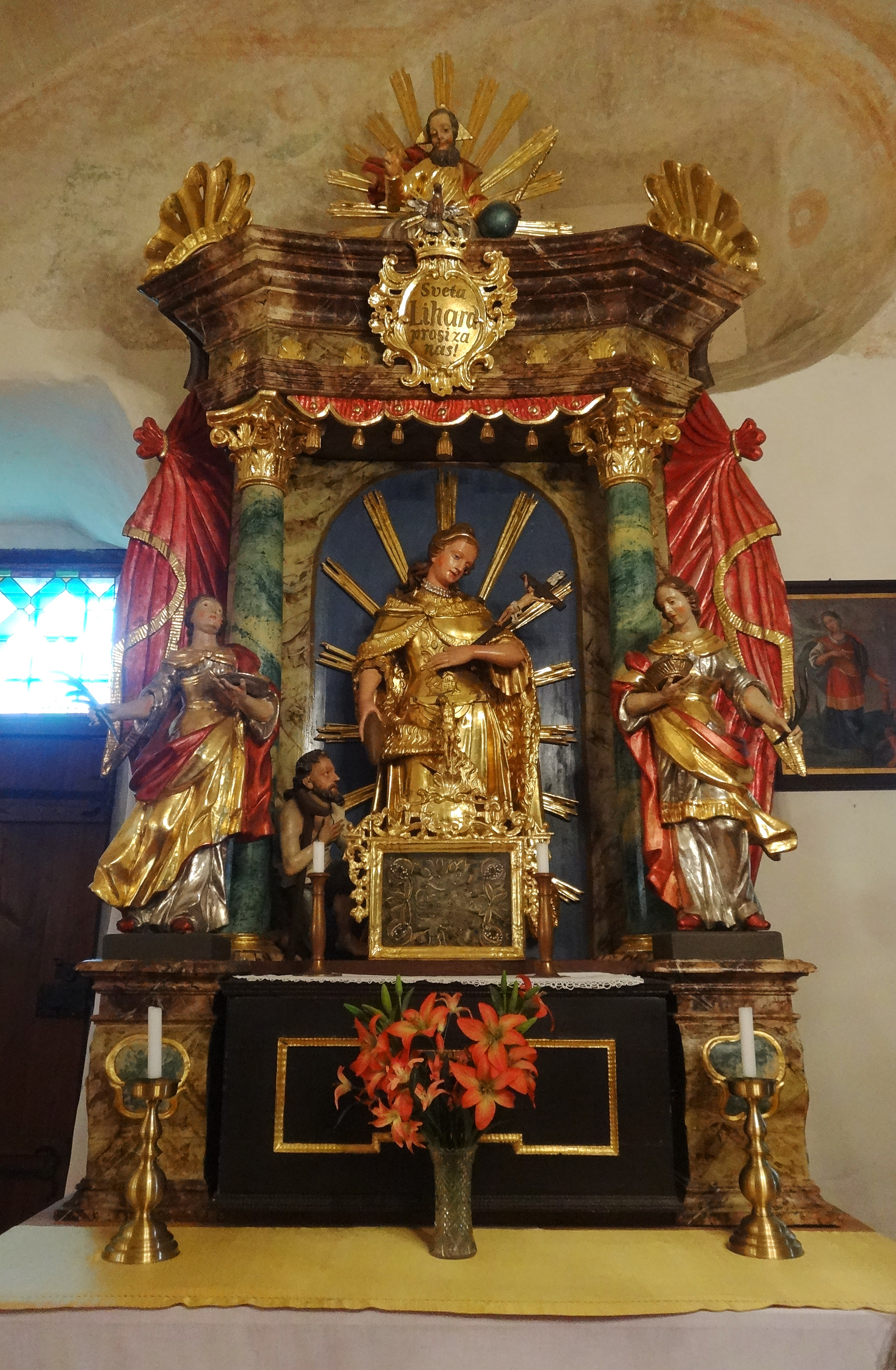 Pfarrkirche Hl. Laurentius, Hildegard-Altar Dieses Bild wurde anlässlich des österreichischen Tags des Denkmals 2013 in Kärnten eingereicht.